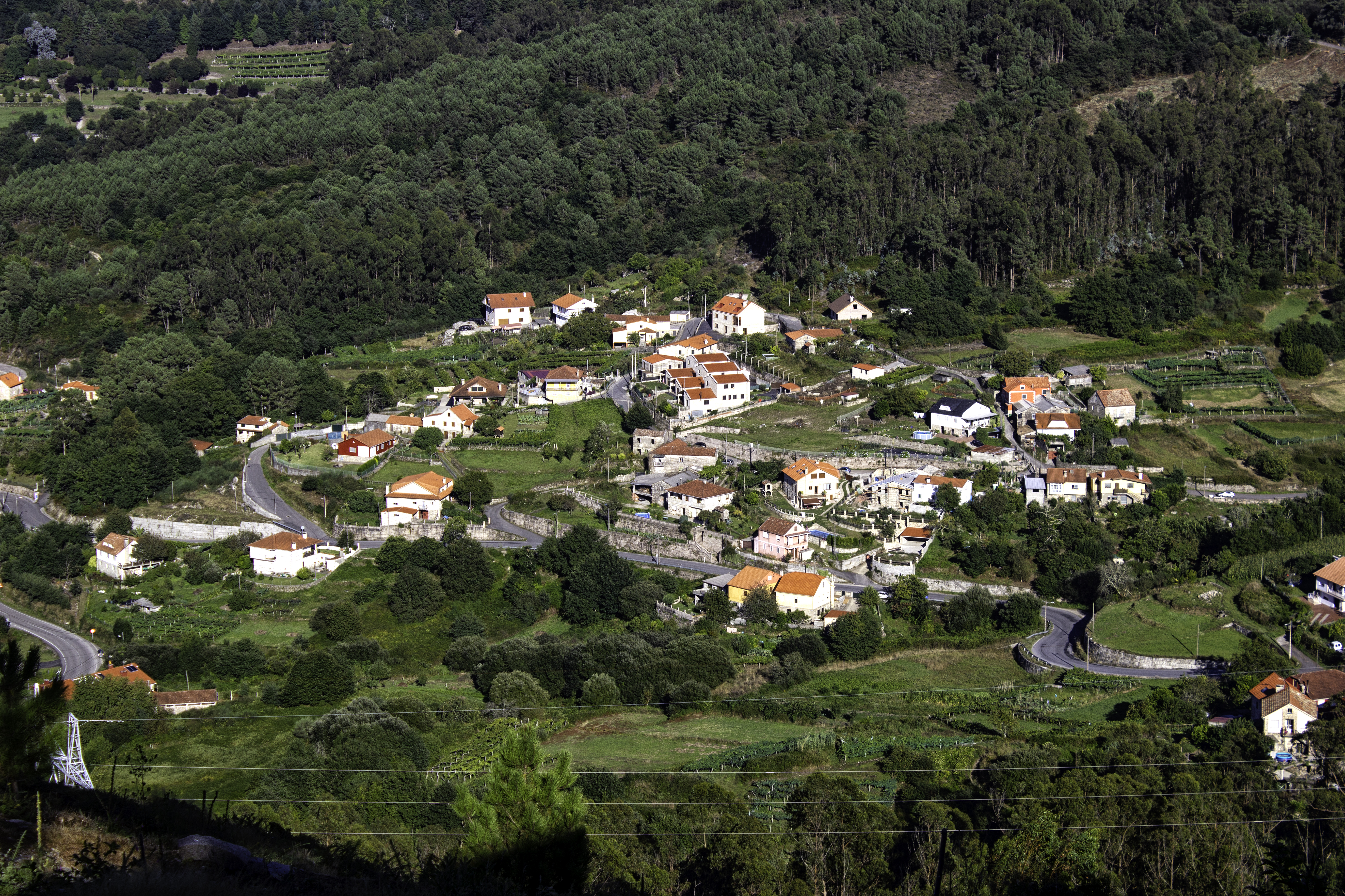 Lugar de Alxán, Soutomaior.